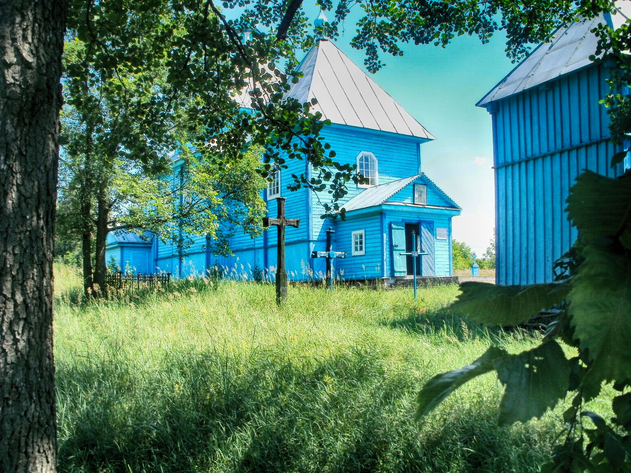 Беларуская (тарашкевіца): Давыд-Гарадок, Георгіеўская царква